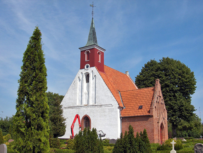 fra sydvest